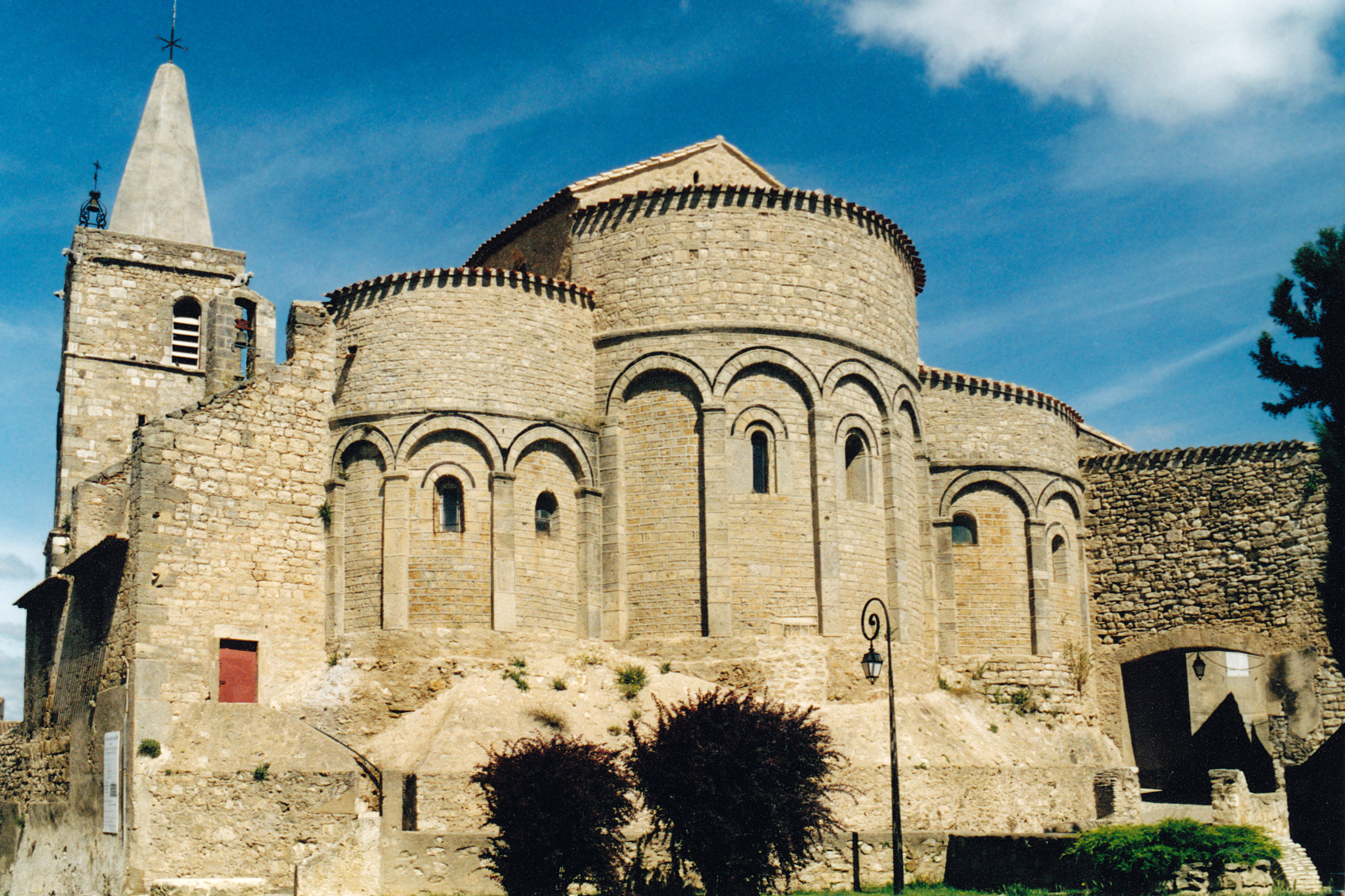 France - Languedoc - Aude - Église Saint-Jean l’Évangéliste d'Ouveillan